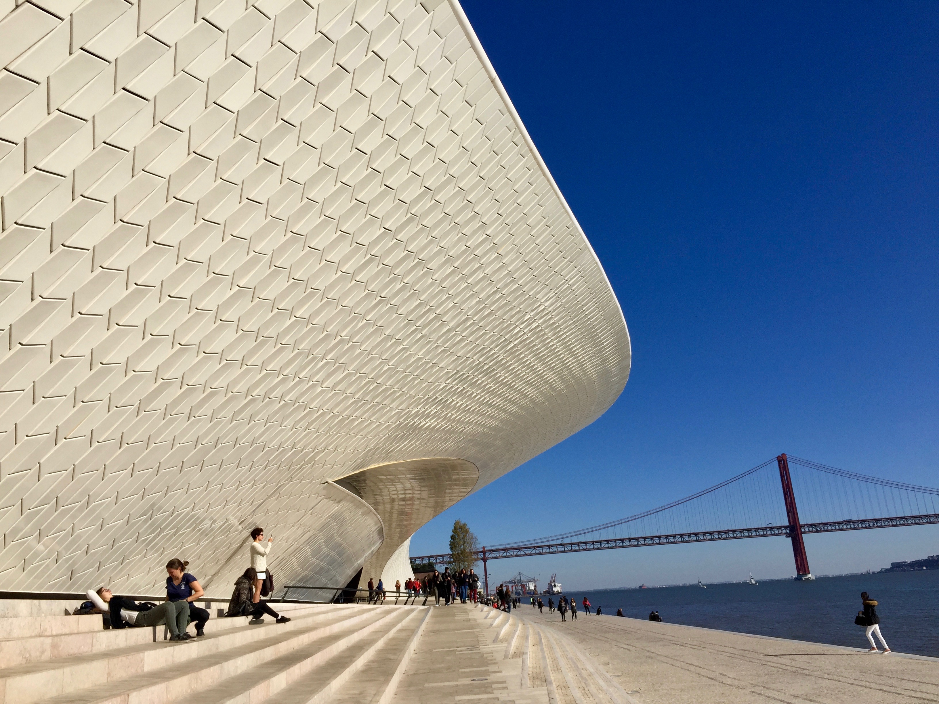 Version 2